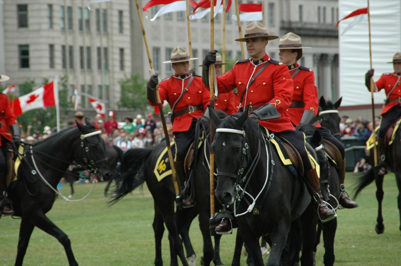 Canada Day - Musical Ride